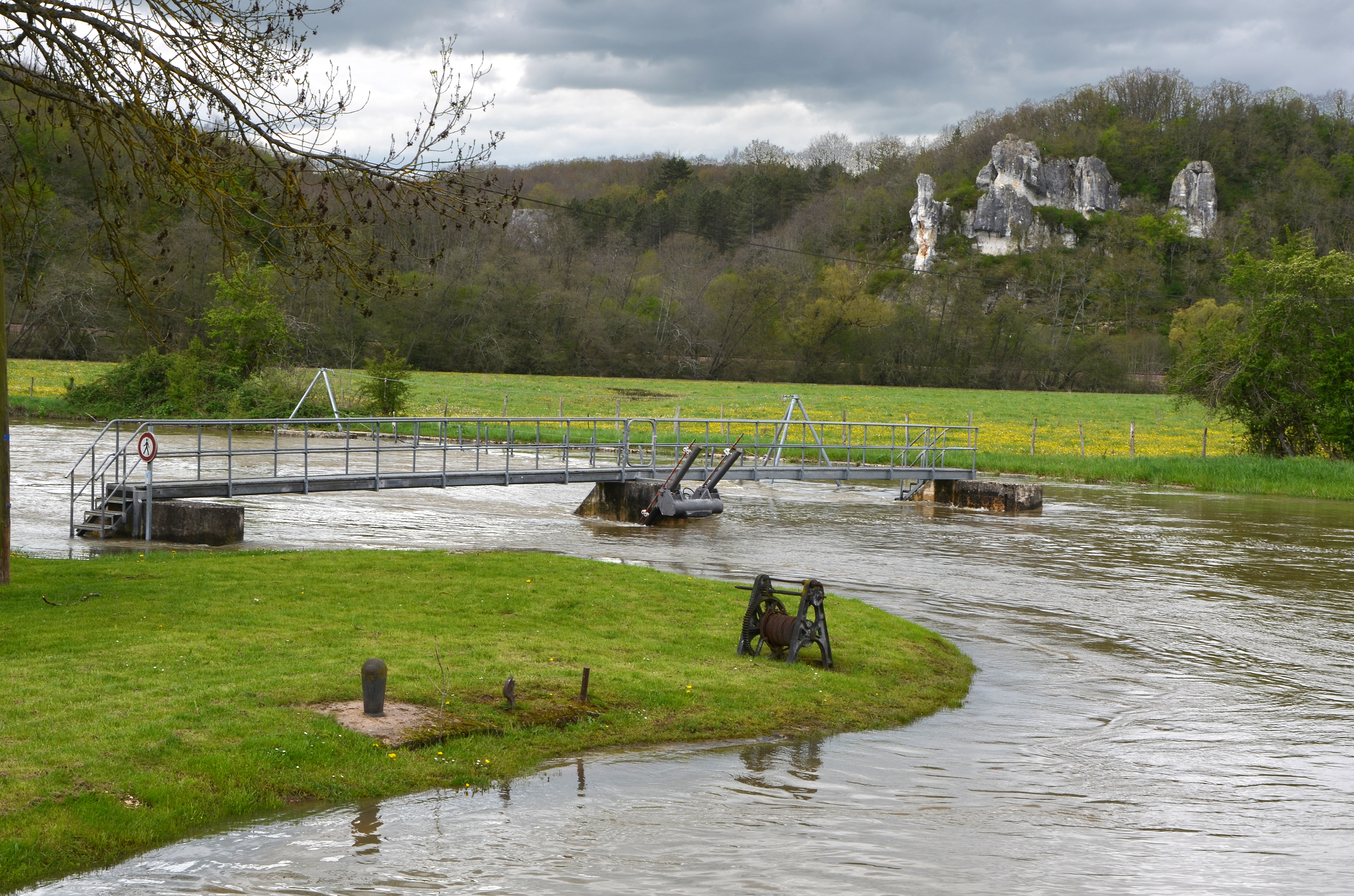 L Yonne en crue près des rochers de Basseville a Surgy, Yonne, France